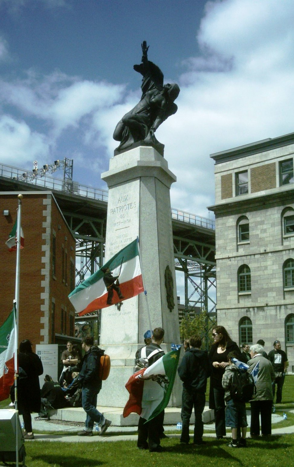 Monument aux Patriotes, sculpture d'Alfred Laliberté, devant l'ancienne prison du Pied-du-Courant à Montréal